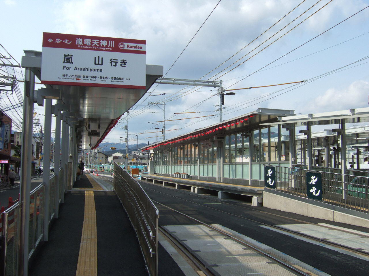 嵐電天神川駅 (Randen-Tenjingawa Station)